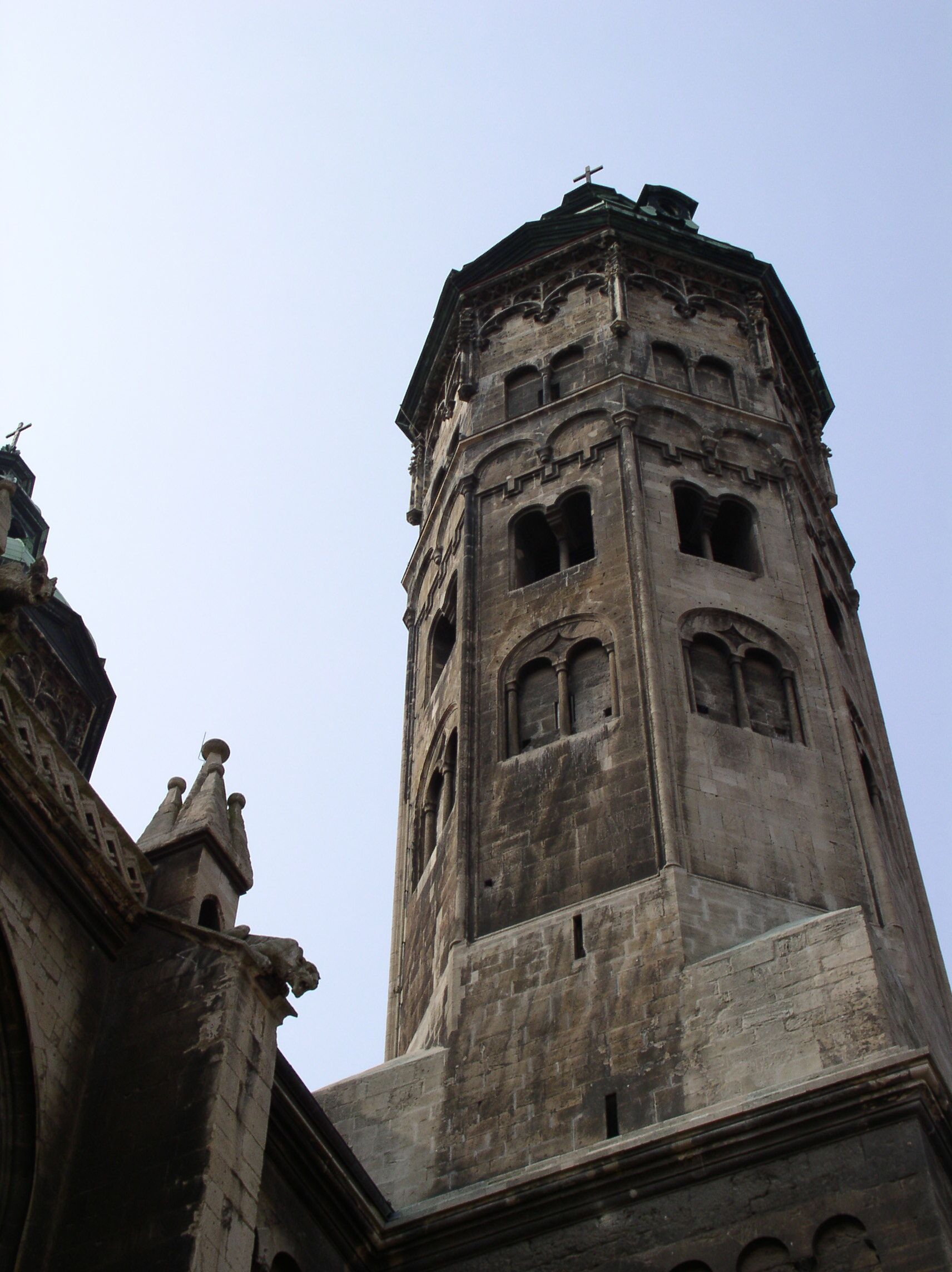 Naumburger Dom